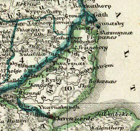 Detail fra "Slesvig i Valdemarernes Tid" efter Valdemars Jordebog